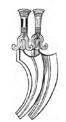 Altägyptisches Chepesch